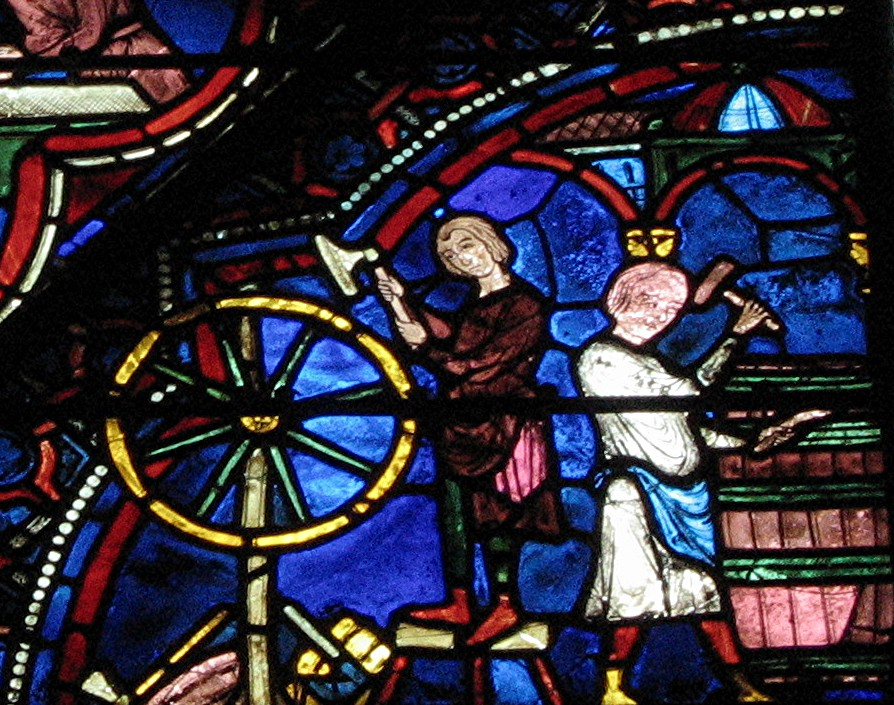 Vitrail de la cathédrale de Chartres, Eure-et-Loir (France).